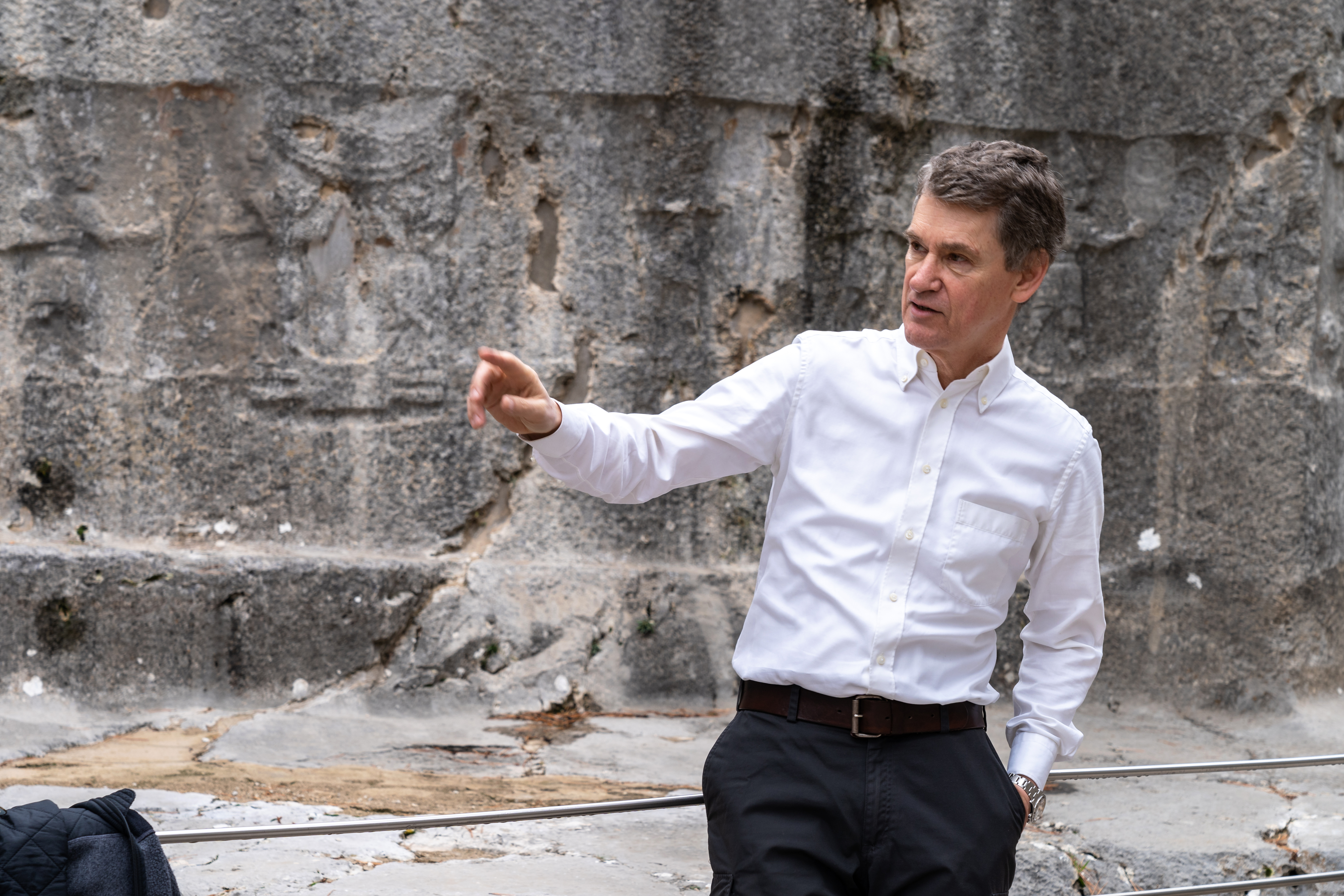 Eberhard Zangger im Dezember 2018 im bronzezeitlichen Felsheiligtum Yazılıkaya in der Türkei.